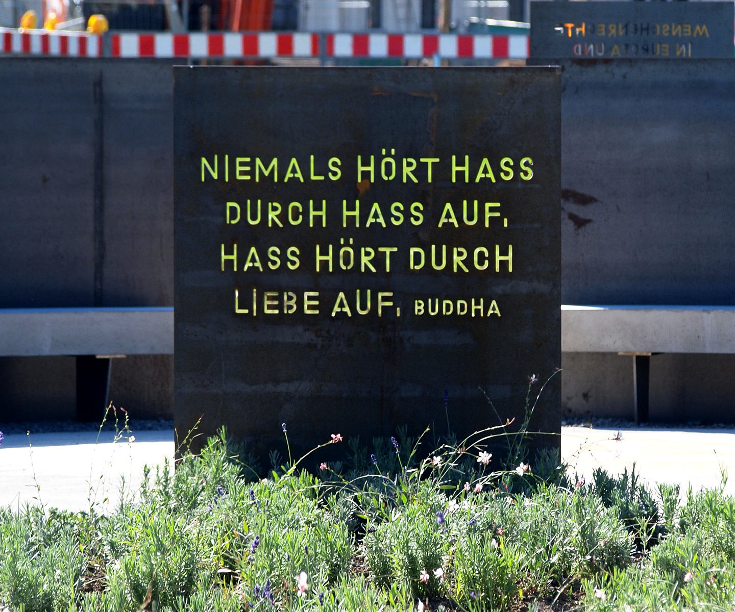 Buddhistischer Kreis im Garten der Religionen in Karlsruhe NIEMALS HÖRT HASS DURCH HASS AUF. HASS HÖRT DURCH LIEBE AUF. buddha